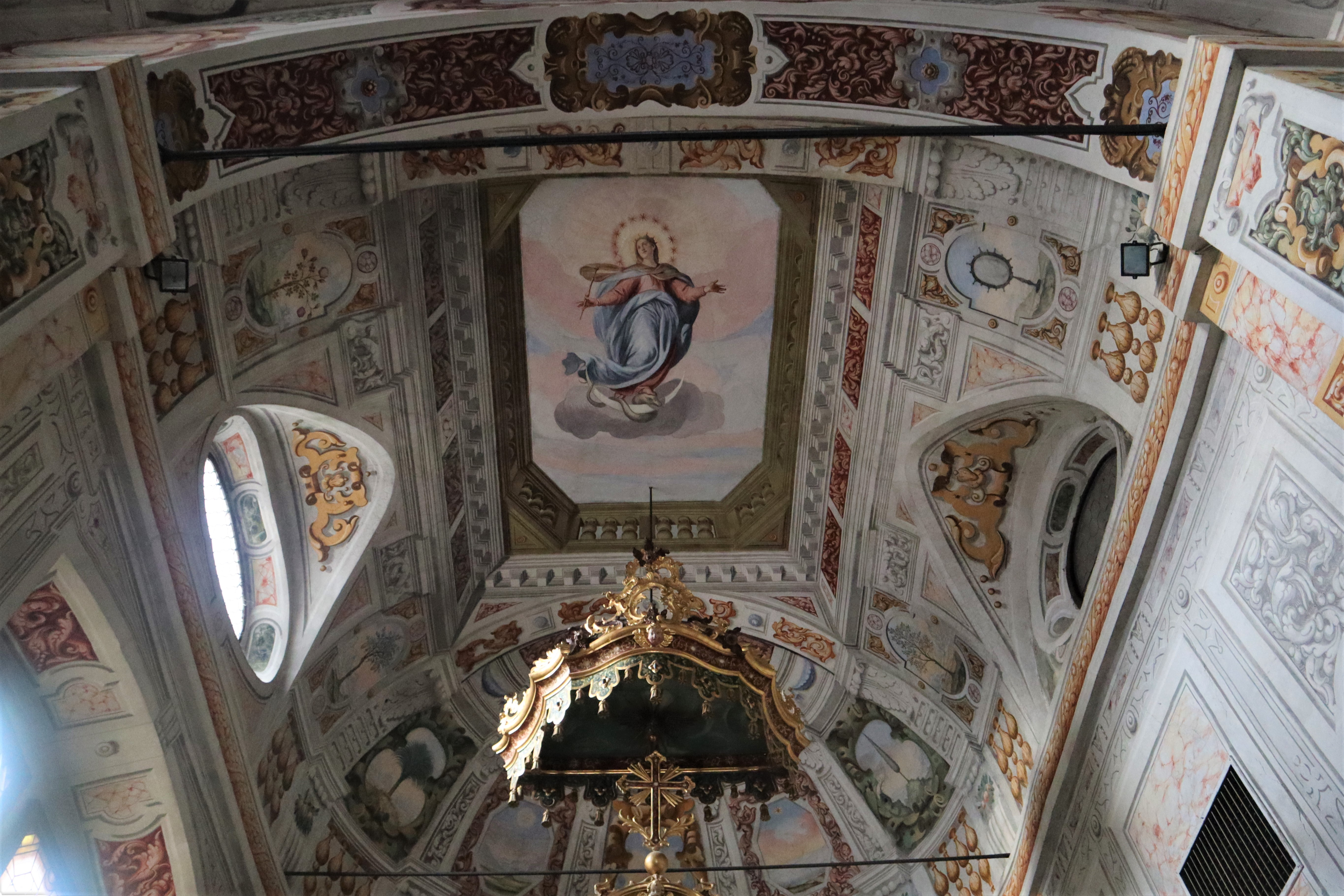 Chiesa della Beata Vergine Maria a Nogaredo. Interno.